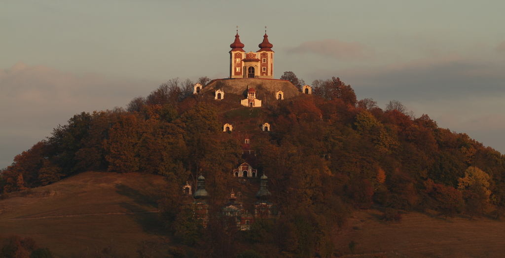 KOSTOL